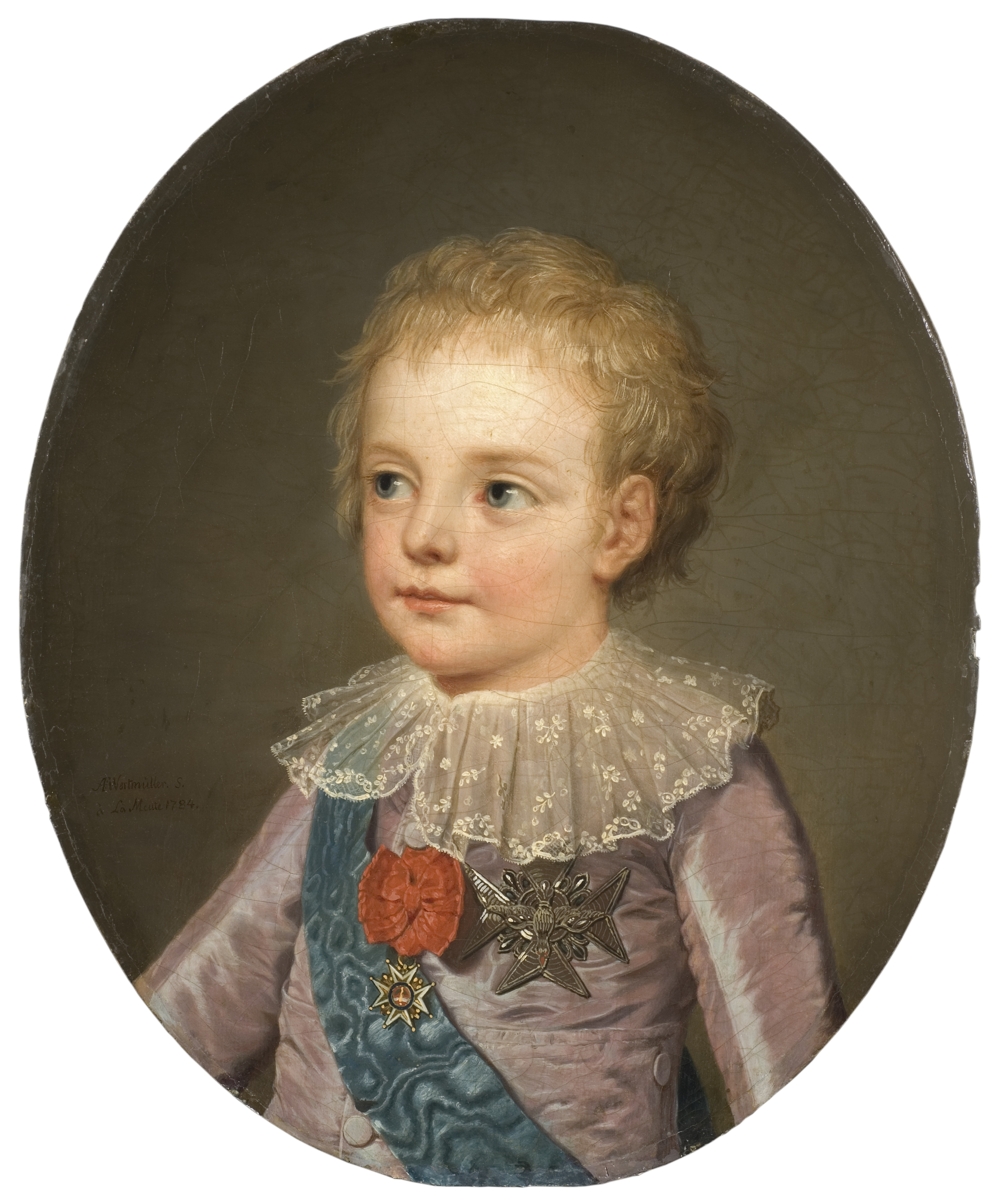 Porträtt av treårig pojke. Bröstbild, face höger. Iklädd sidenkolt med spetskrage. Bär blått sidenband över bröstet samt två ordnar: Heligeandeordens kraschan och band (l'Ordre de Saint-Esprit) samt S:t Louisorden i rött band (l'Ordre de Saint-Louis). Bakgrunden monokrom. I samband med sitt Parisbesök 1784 beställde kung Gustav III det berömda porträttet av drottning Marie-Antoinette promenerande med sina barn i Trianons park. Inför arbetet med denna stora målning satt Marie-Antoinette och barnen modell för Wertmüller. Drottningen och prinsessan porträtterades i Petit Trianon medan drottningen, enligt Wertmüllers självbiografi, "gaf order at jag skulle få måla hans k: höghet le Dauphin på la Muette" (den franske kronprinsens residens vid Paris). Bronserad originalram med dekor av franska liljan.